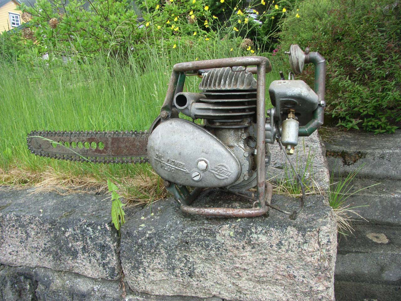 Jobu Senior motorsag.